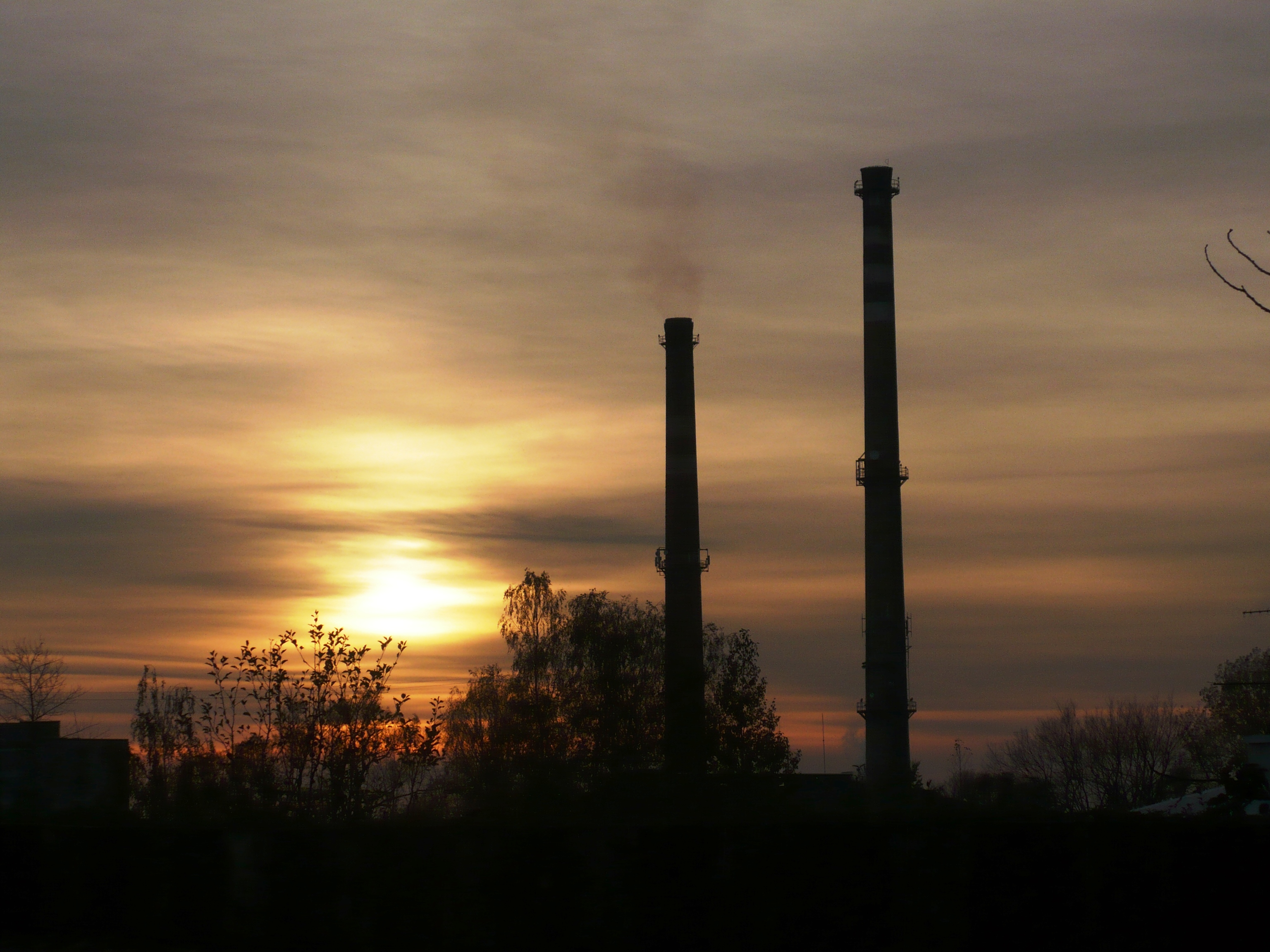 Kominy Fabryki Papieru w Myszkowie na tle zachodu słońca